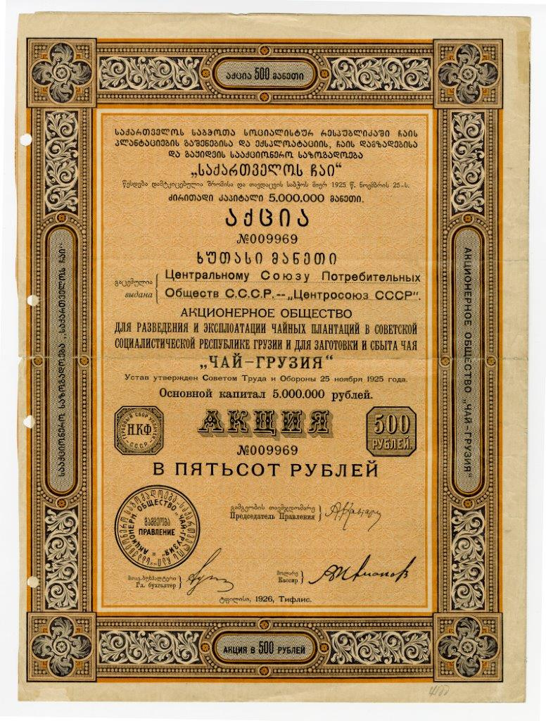 Акция в 500 руб., именная, акционерного общества "Чай-Грузия". Тифлис, 1926 г.